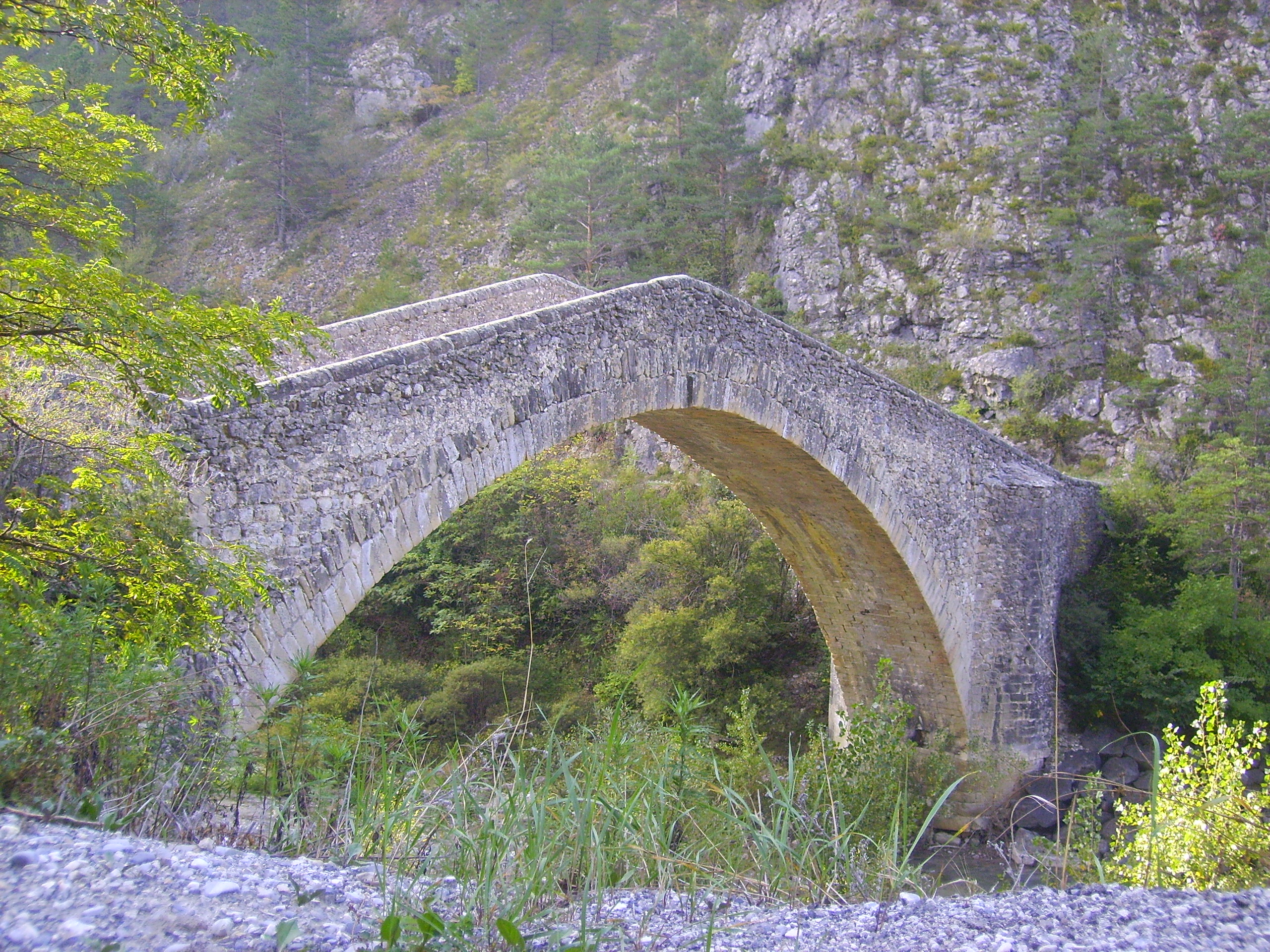 Le pont de la reine Jeanne entre Entrevaux et Annot